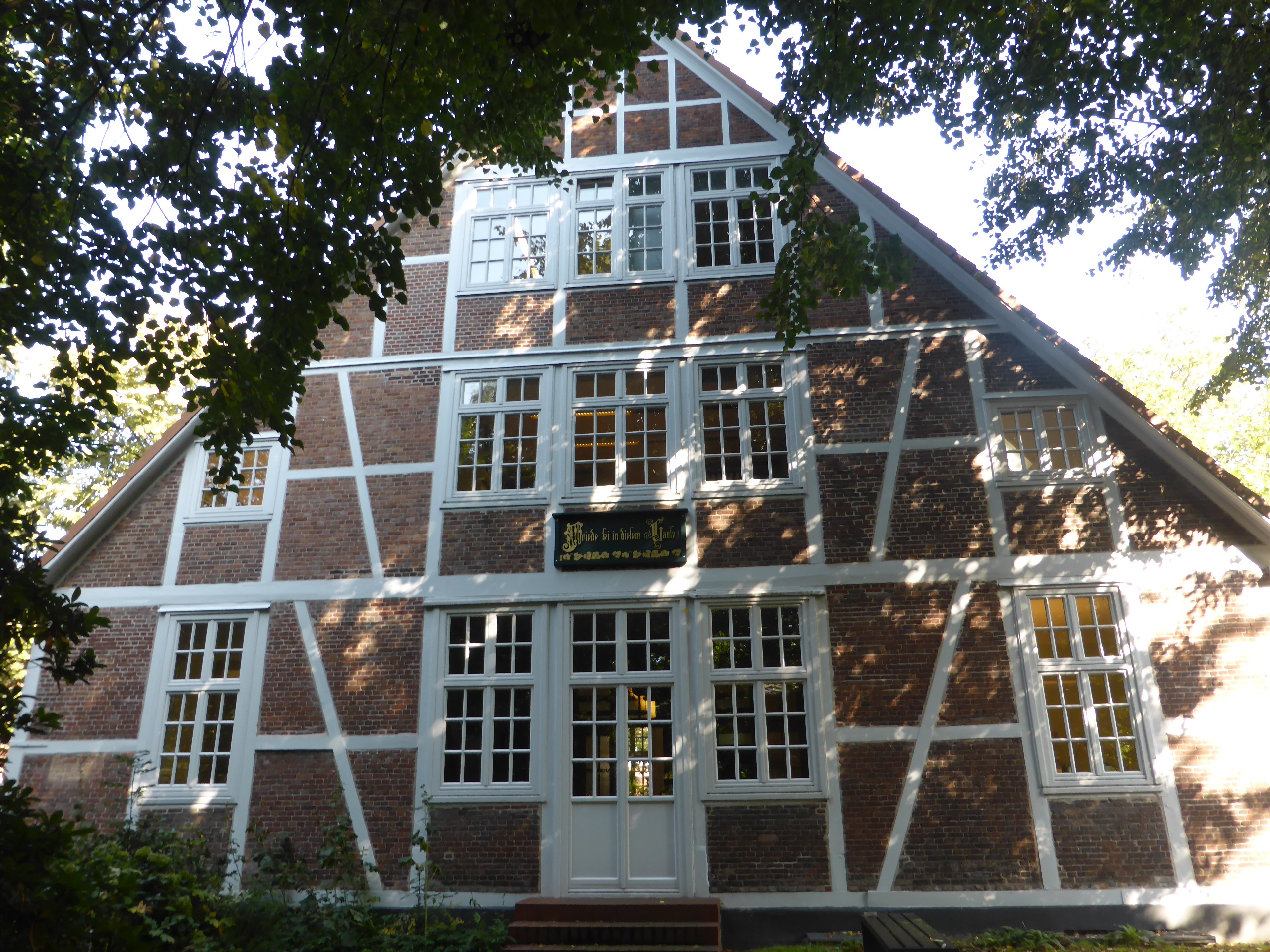 Das Haus Tanne überstand die Bombardierung 1943 und präsentiert sich heute als historisches Fachwerkhaus